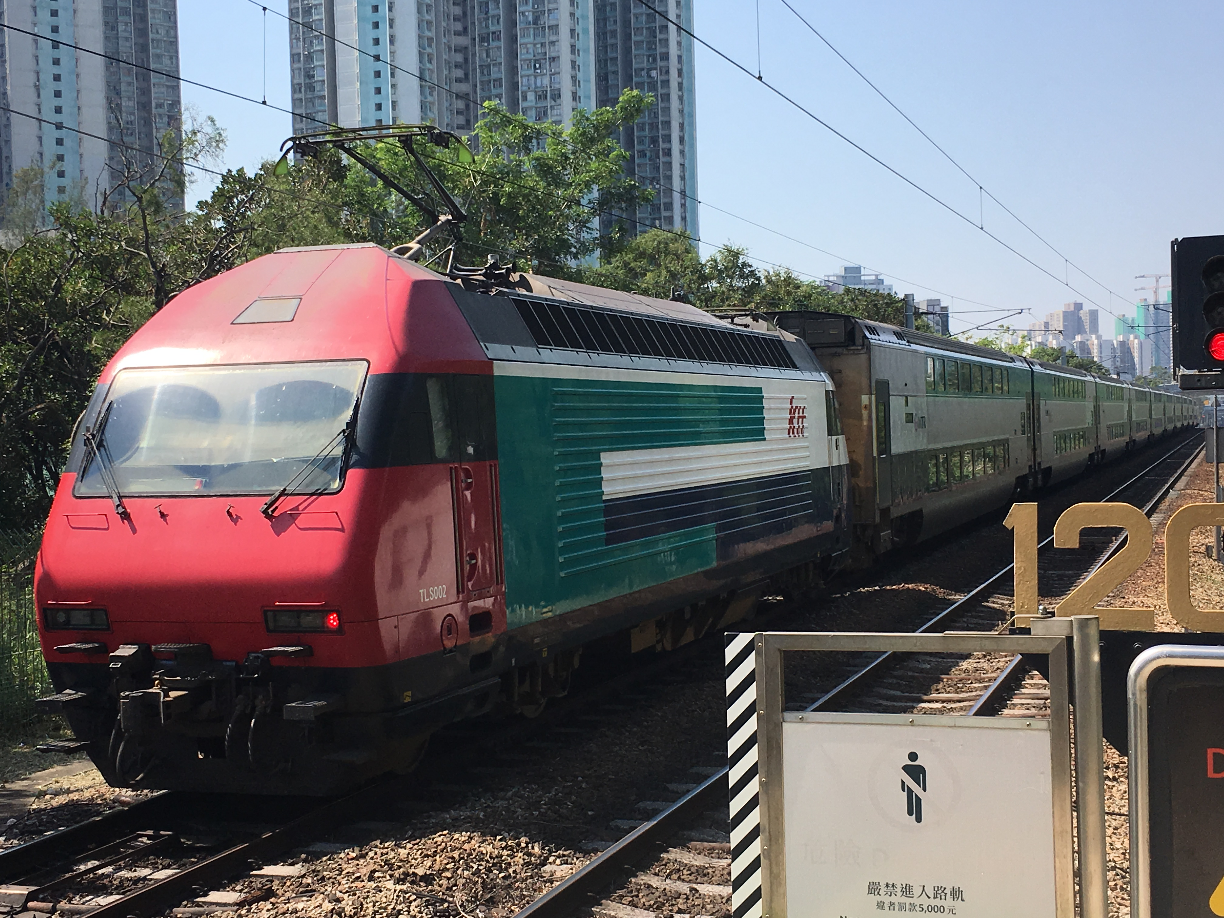 This photo is taken in Fanling Station.